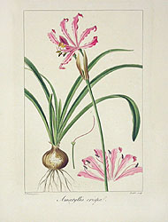 Amaryllis crispal